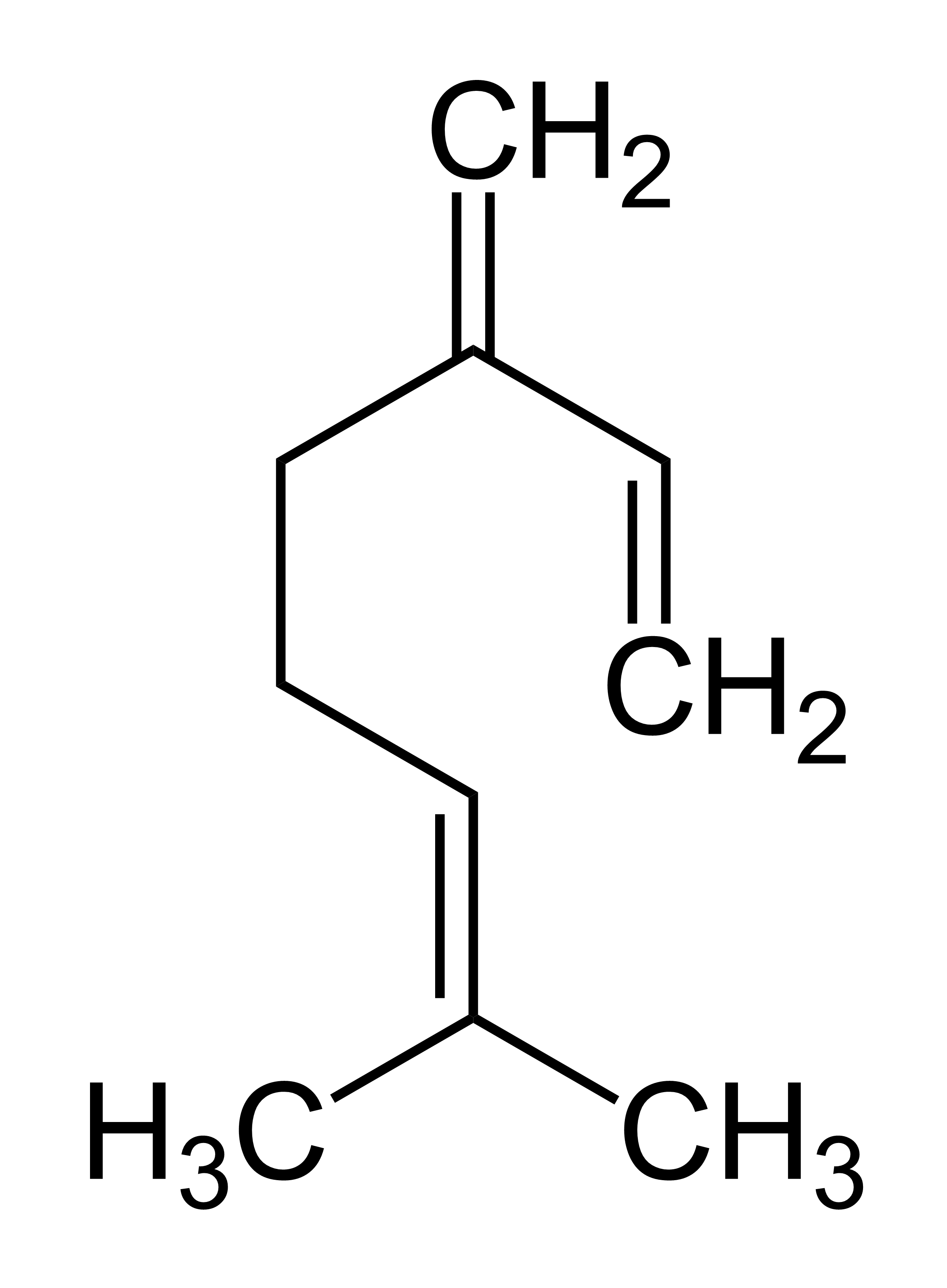 Myrcen (Bestandteil ätherischer Öle)